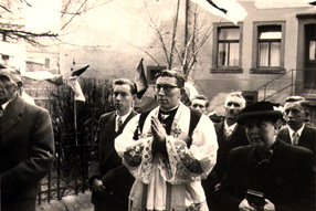 v. l. Johann Stiren, Konrad Stiren, Josef Stiren, [unbekannt], [unbekannt], Maria Stiren, Anton Stiren (laut Josef Stiren im Frühjahr 1955